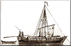 Поморский Шитик